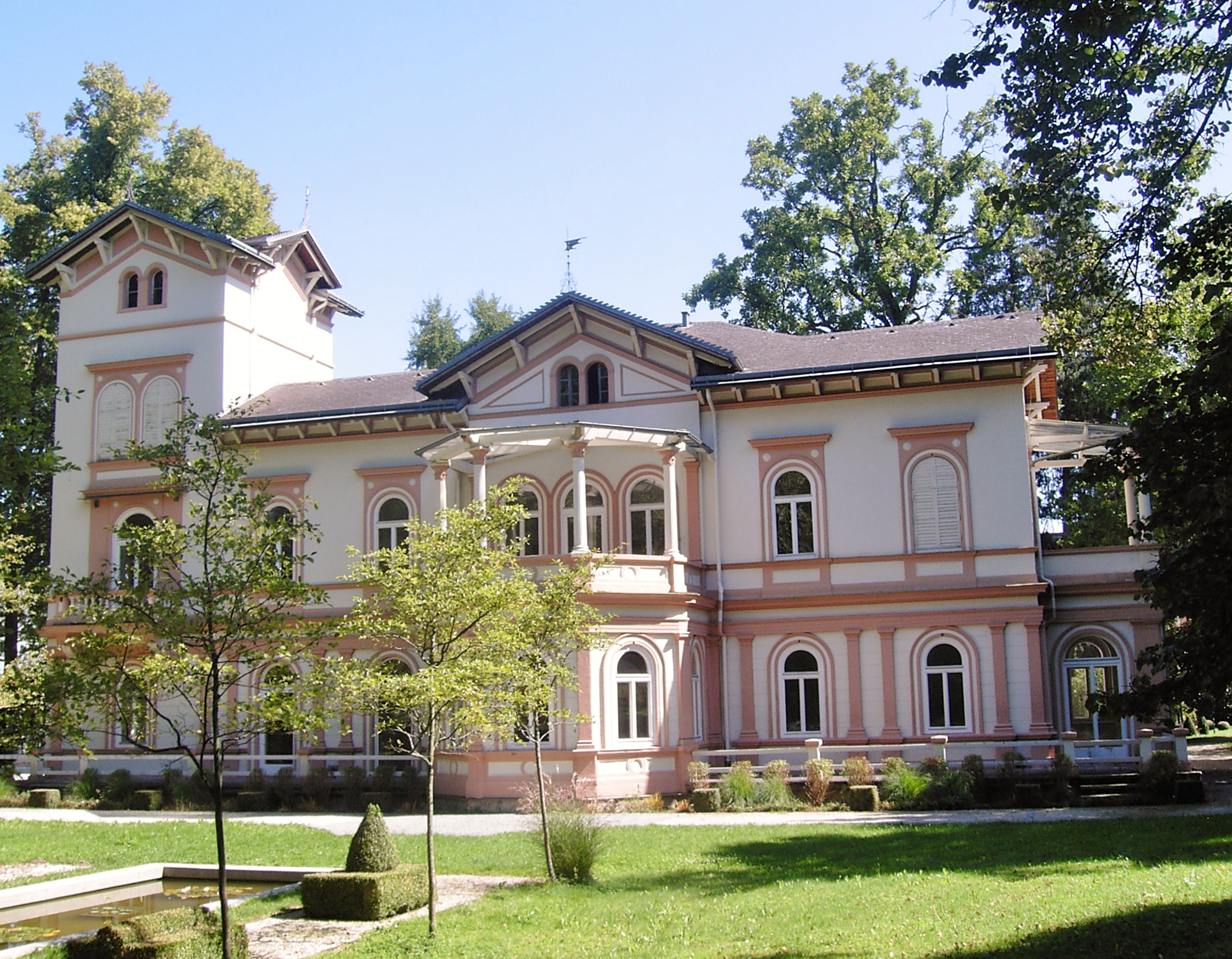 Bad Hall Rabl-Villa Kurpromenade 2, Westansicht